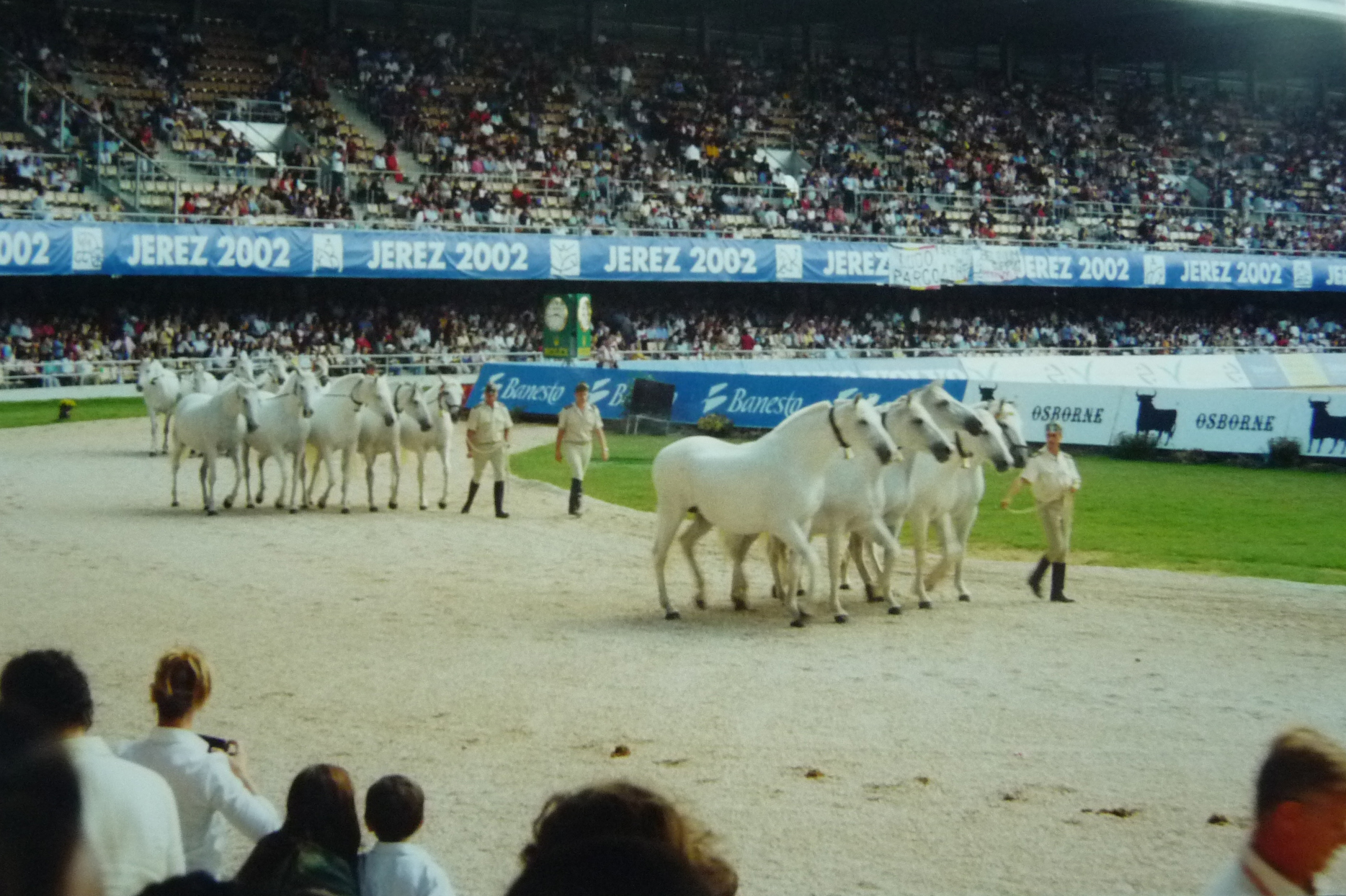 Jerez 2002, Jerez de la Frontera (Andalusia, Spain)